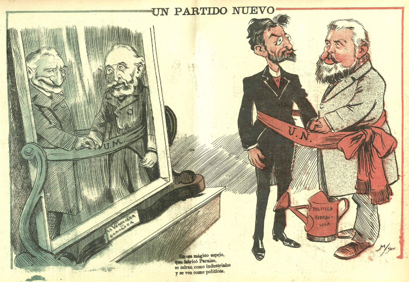 Un partido nuevo, en la revista satírica española Gedeón.